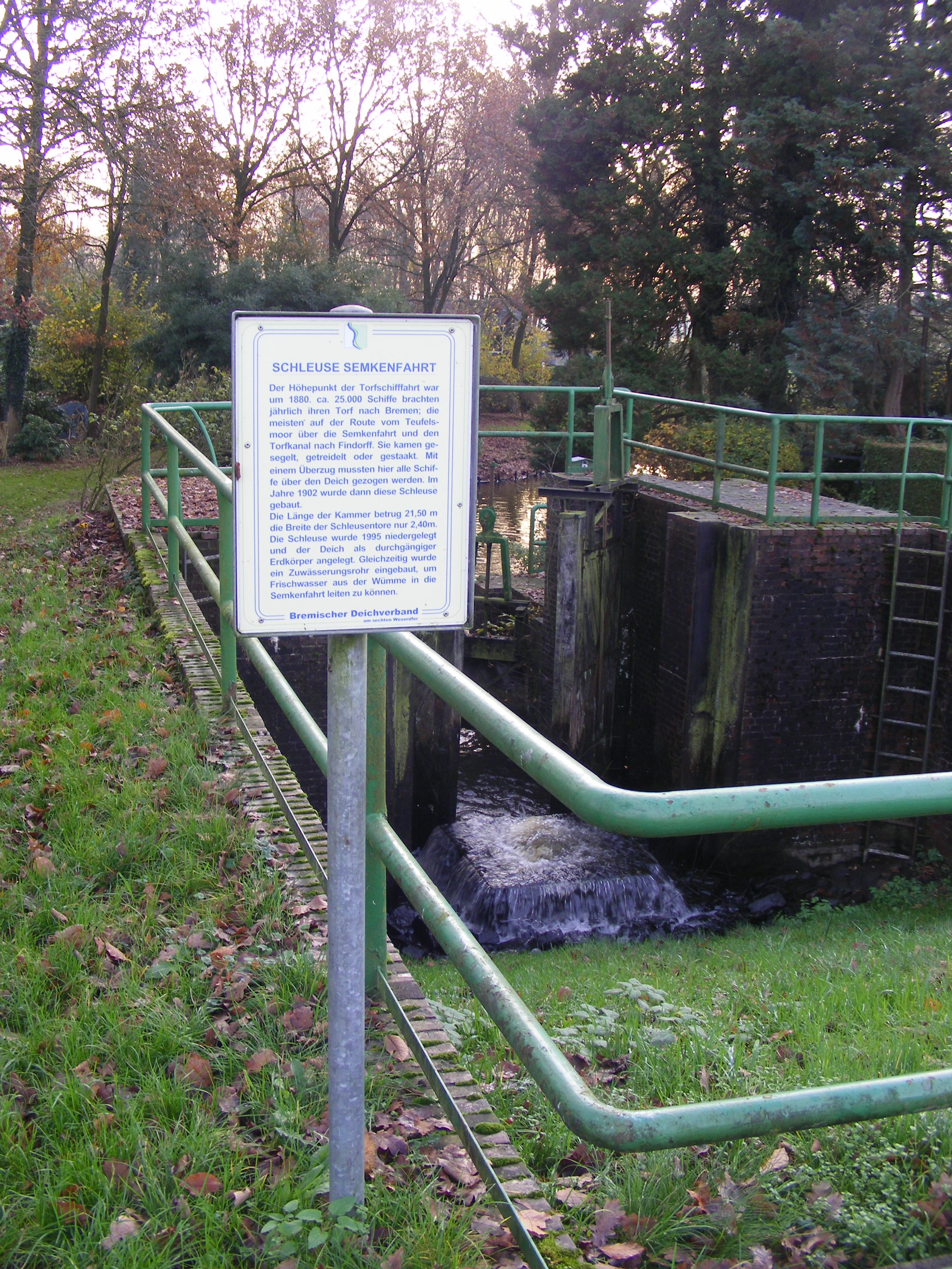 ehemalige Schleuse Semkenfahrt mit Informationstafel